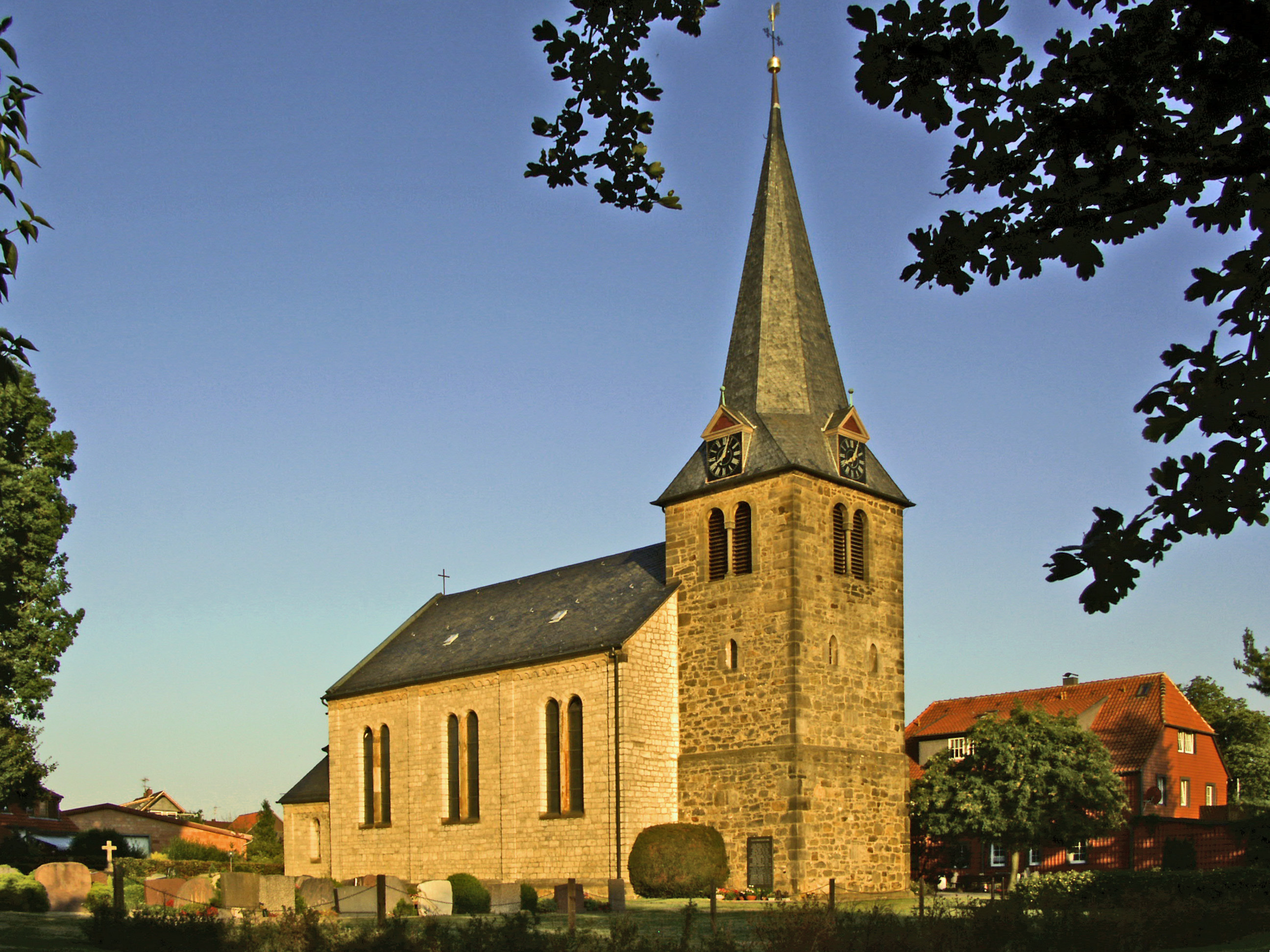 Katholische Kirche Unbefleckte Empfängnis Maria in Einum, Stadtteil von Hildesheim